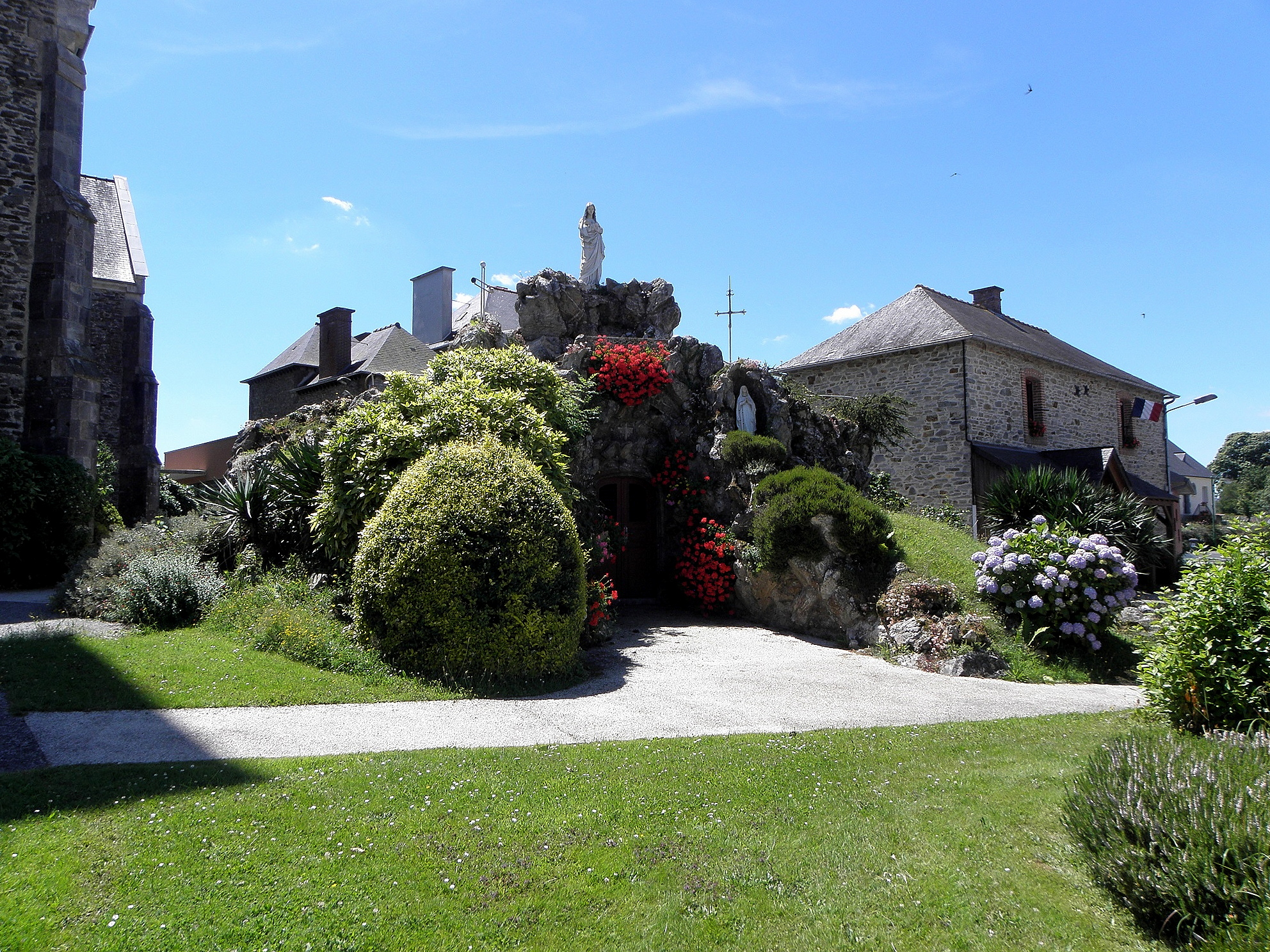 Rocher de La Salette près de l'église de Marpiré (35) réemployant la porte, l'autel et la croix de l'ancienne chapelle de Bon secours du Val-d'Izé (35). Bénédiction le 12/07/1885. 1ère extension en 1887 dédiée à N.D. des Sept Douleurs et bénie en 1889. 2ème extension en 1909 consacrée à N.D. de Lourdes (statue de sainte-Bernadette de 1956).